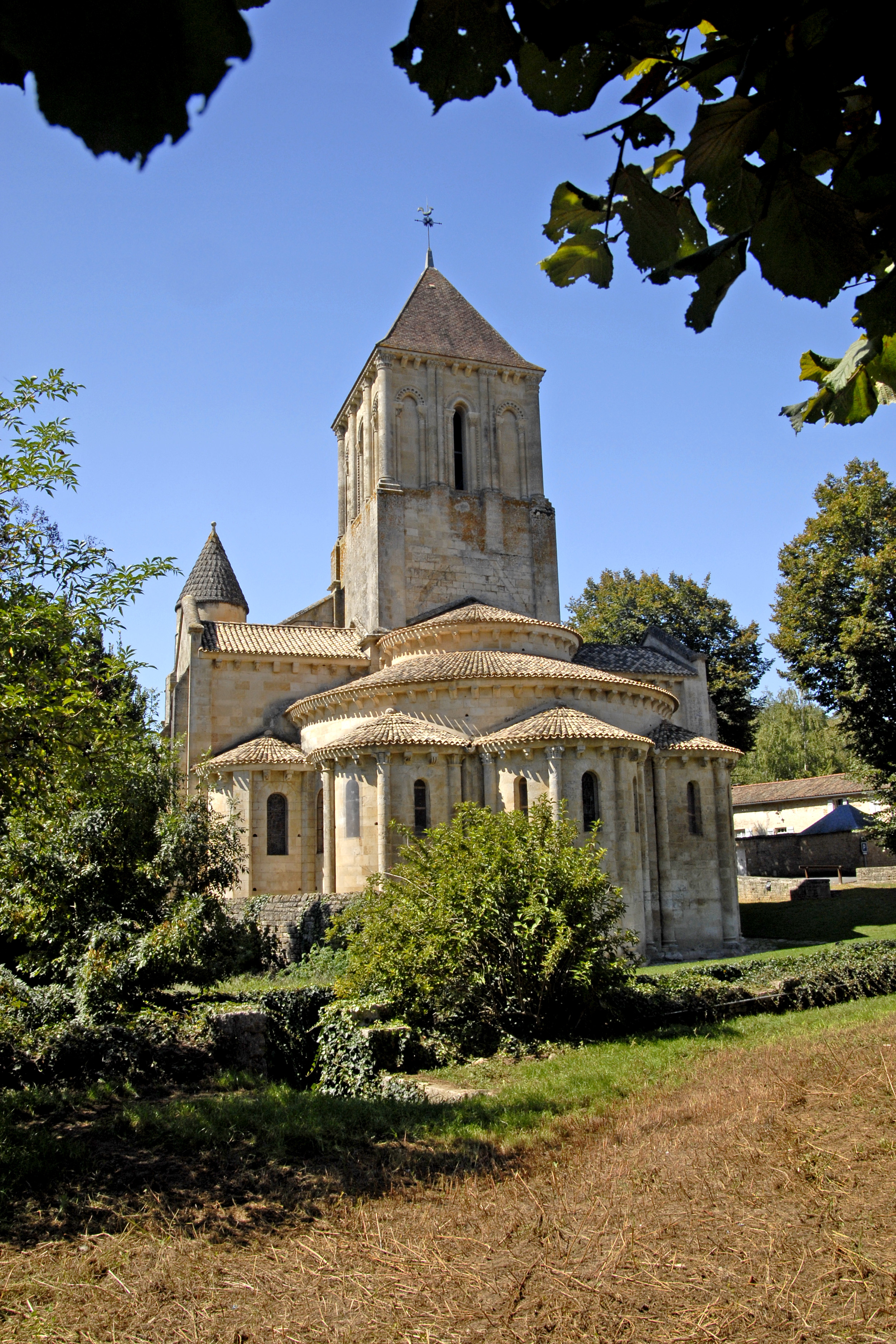 Melle, St.-Hilaire, Chorhaupt